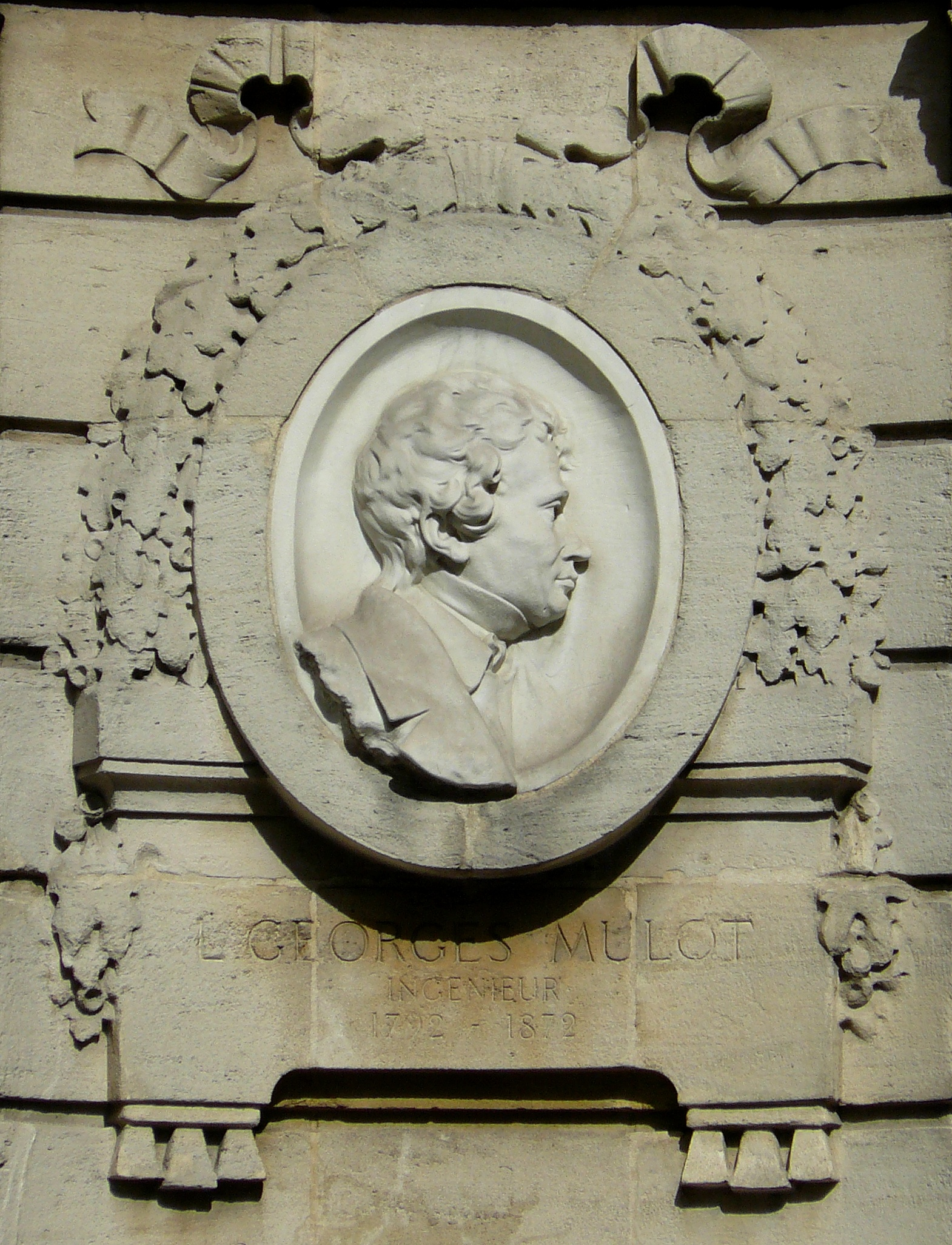 Fontaine du Puits de Grenelle, Place Georges Mulot, Paris XVème - médaillon décorant une face de la fontaine et représentant l'ingénieur Louis-Georges Mulot.